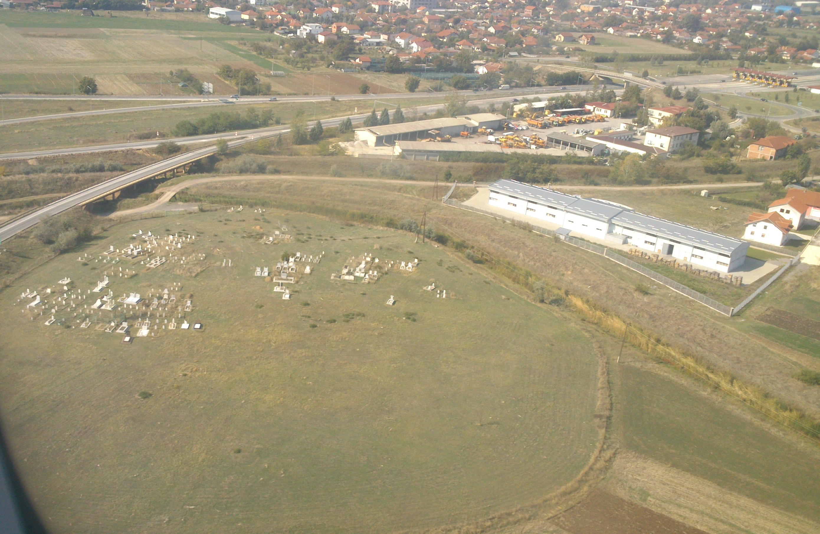 Petrovec, Macedonia